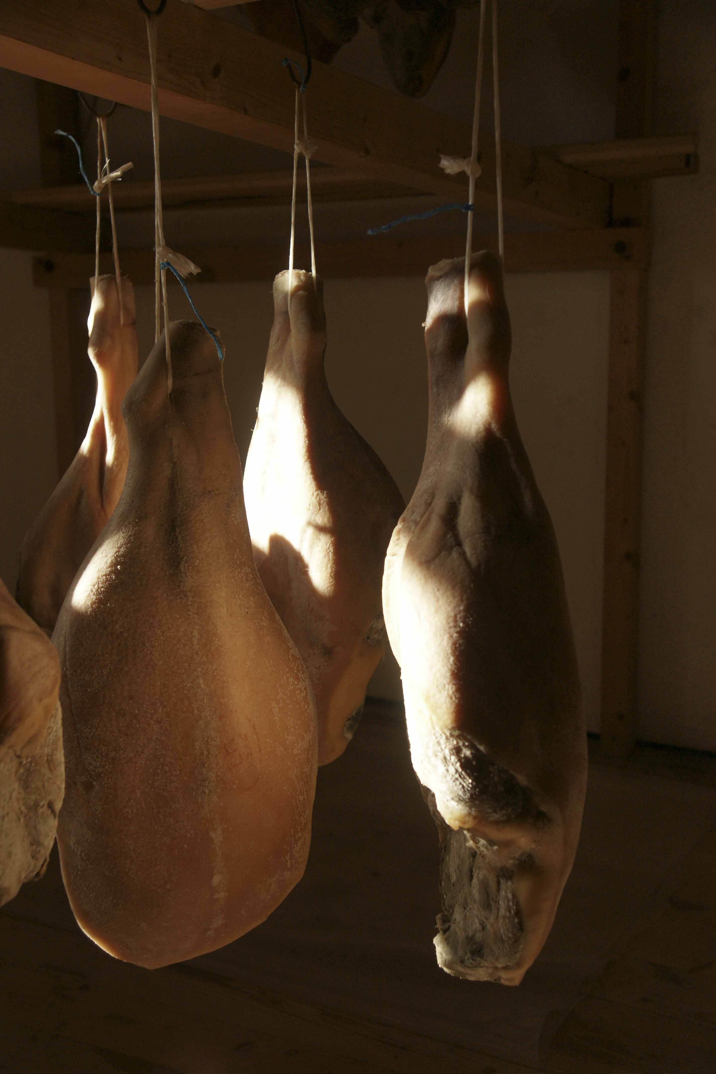 Herstellung von Trockenfleisch nach traditioneller Methode, Parpan, Kanton Graubünden Trockenfleisch